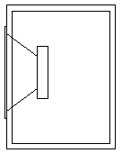 caixa